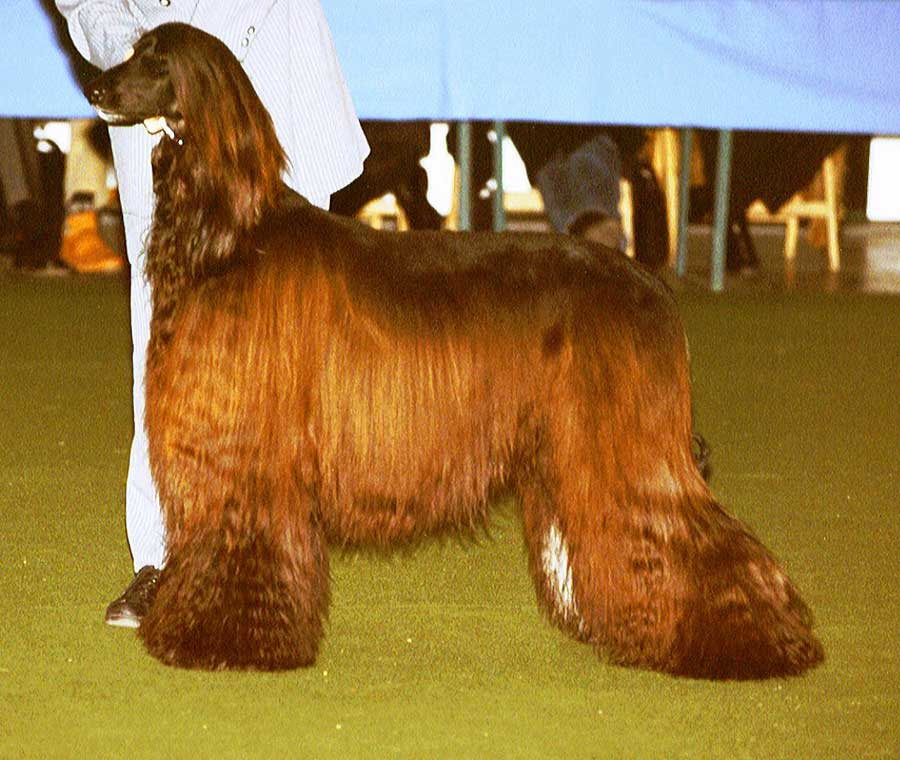 Afghanischer Windhund, rot, auf Show gezüchtet